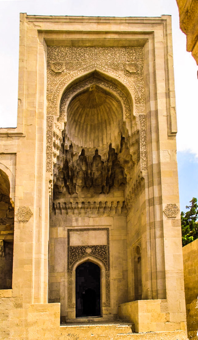 Şirvanşahlar sarayında Divanxananın portalı